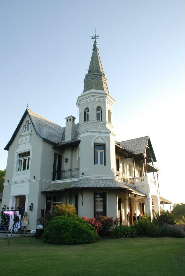 Asociación Argentina de Polo, Pilar